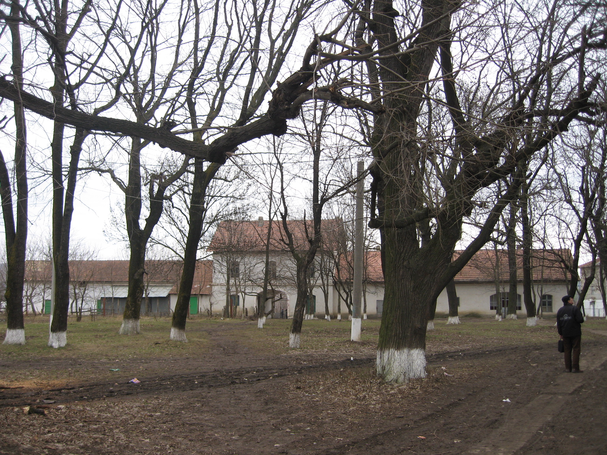 Conacul Carp din Țibănești, jud. Iași, România